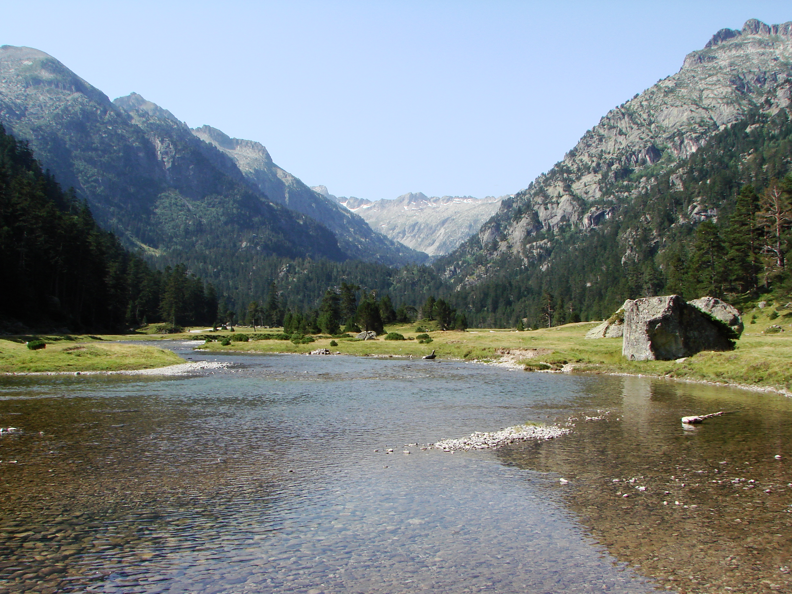 Vallée du Marcadau, Pyrénées françaises, commune de Cauterets, département des Hautes-Pyrénées (France)